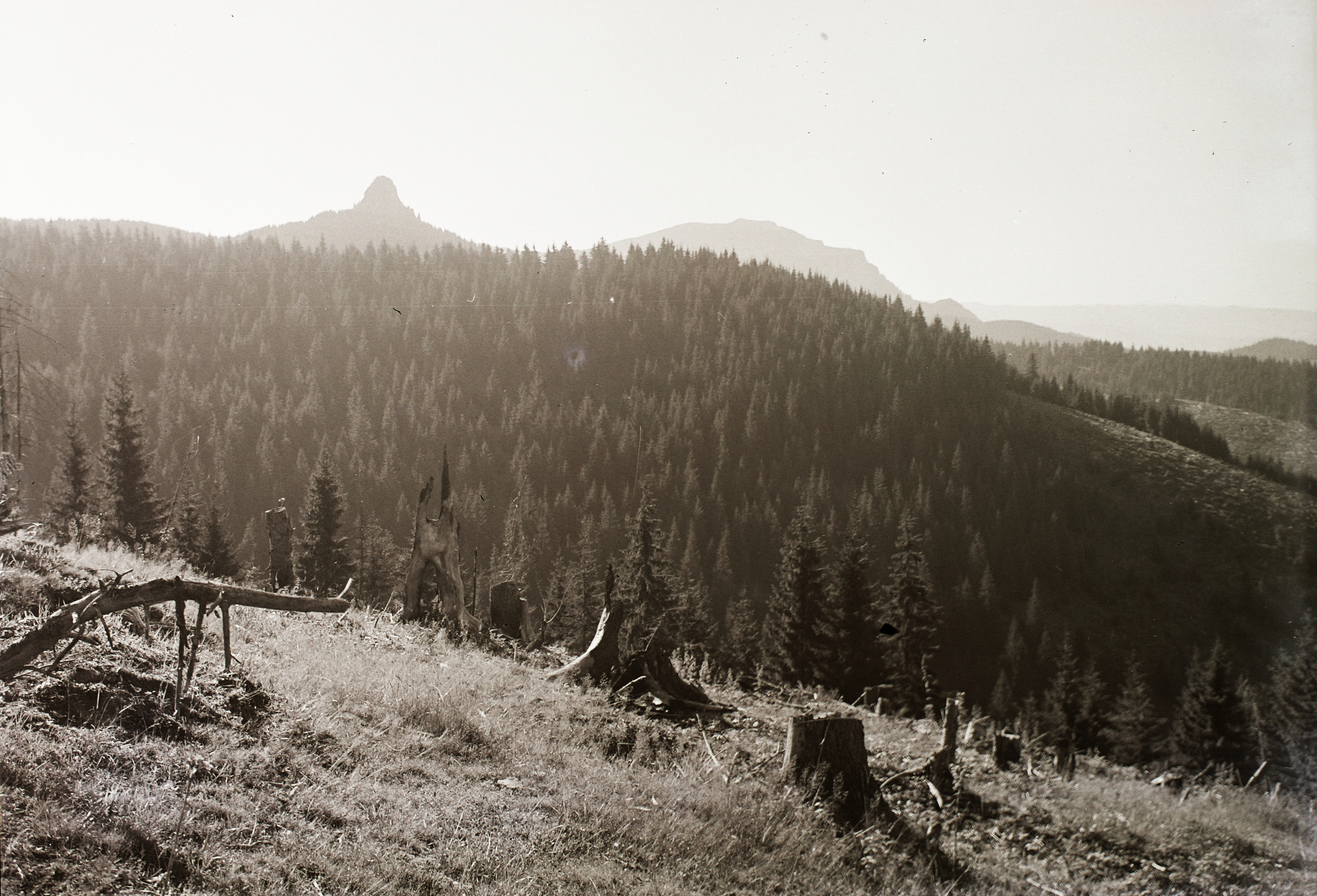 a távolban balra a Csofronka, jobbra a Nagy-Hagymás. Location: Romania, Transylvania, Hasmas Mountains Tags: picture, pine forest Title: a távolban balra a Csofronka, jobbra a Nagy-Hagymás.